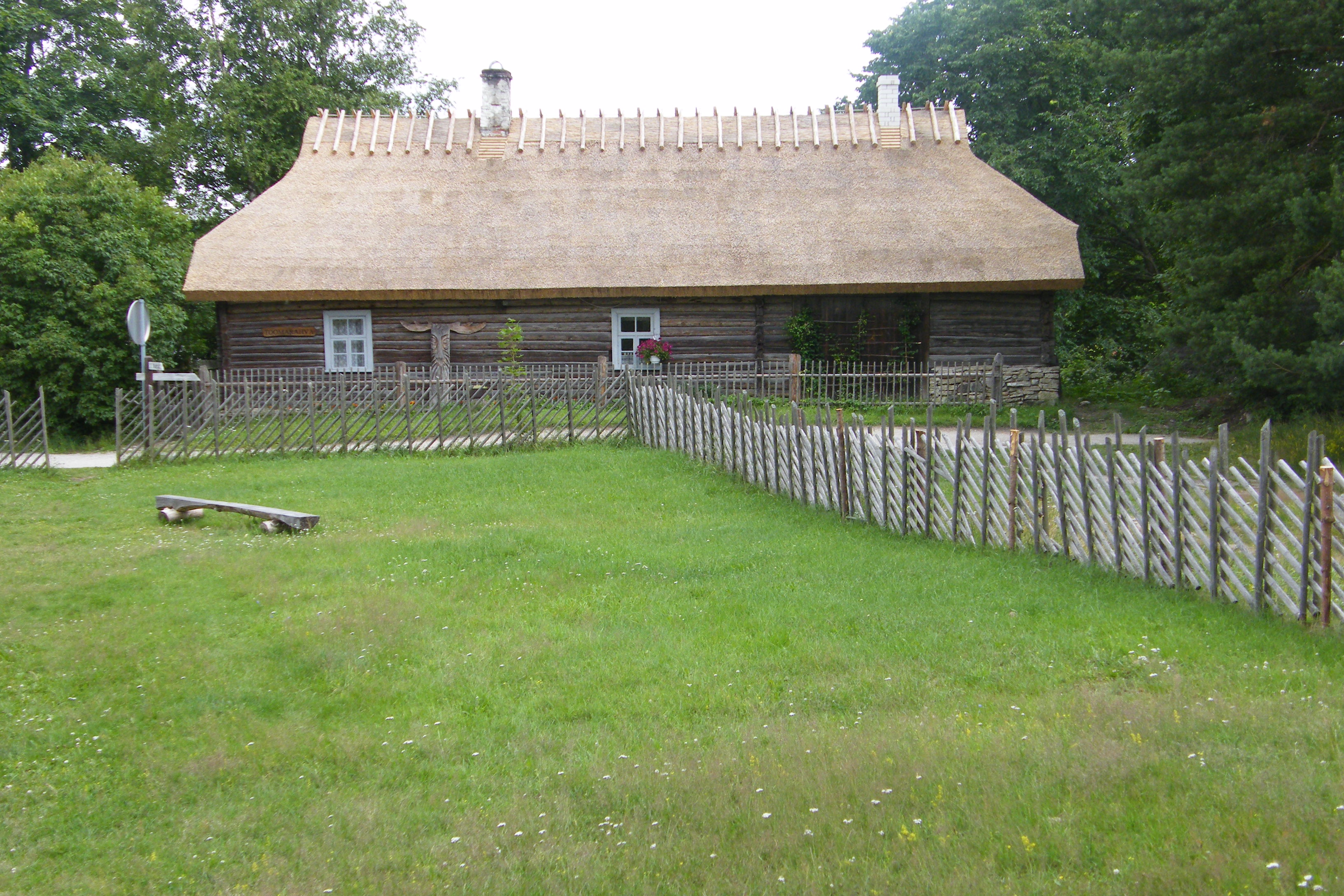 Toomarahva talu, Altja